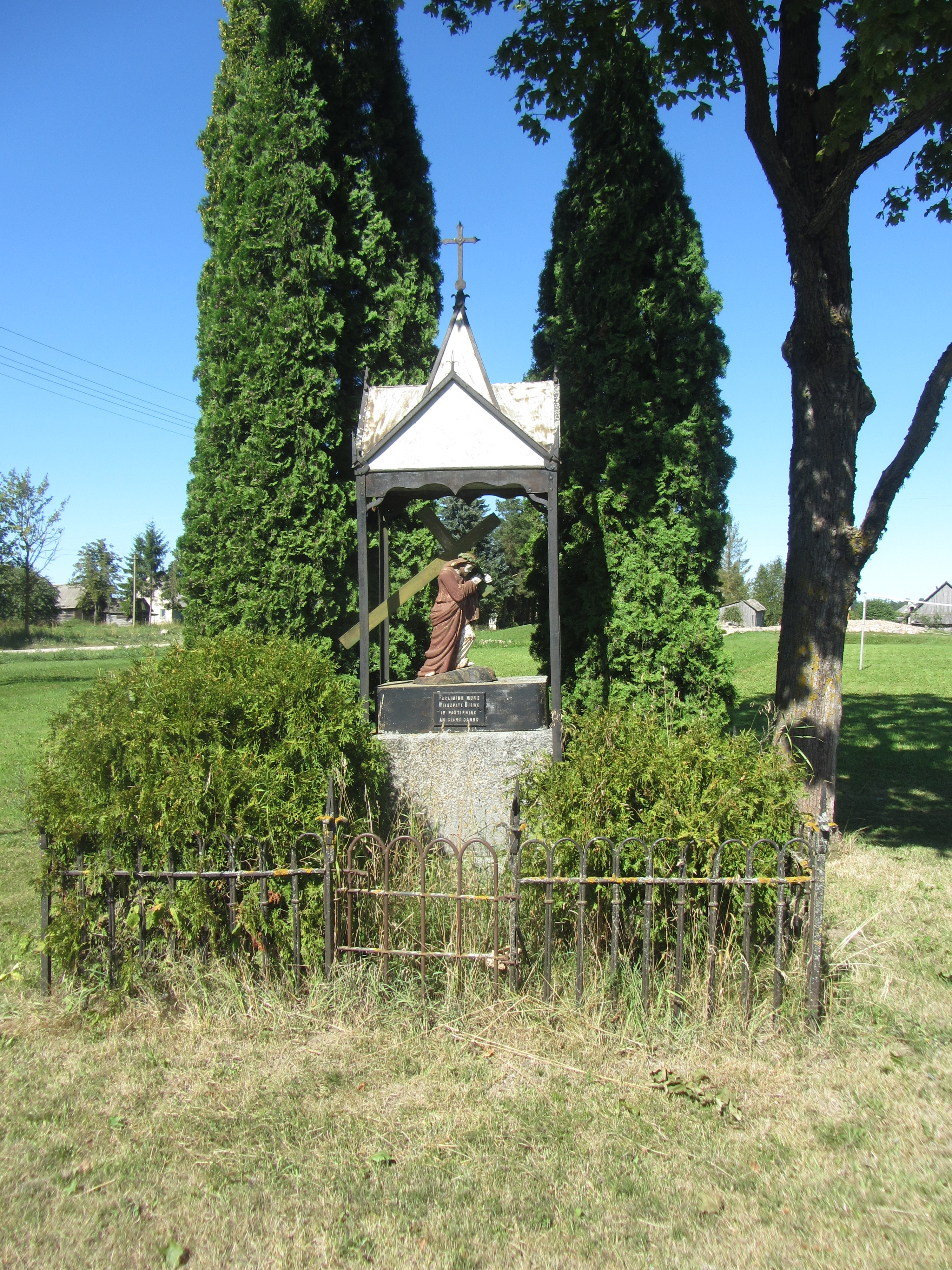 Biliūnai, Lithuania